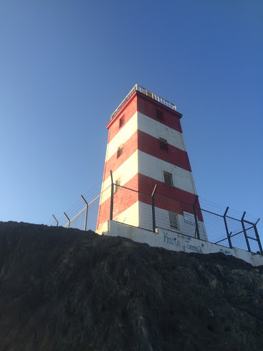 Faro de Punta Caldera en 2015